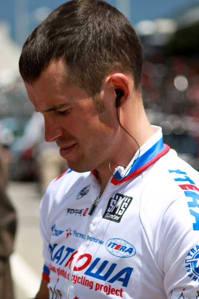 Alexandr Kolobnev